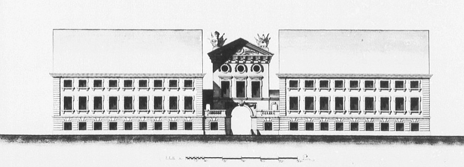 Schloss (jetzt Rathaus) Gammertingen, Zeichnung von Michel d'Ixnard, 1776 Landesmuseum Württemberg, Inv. 1968/7